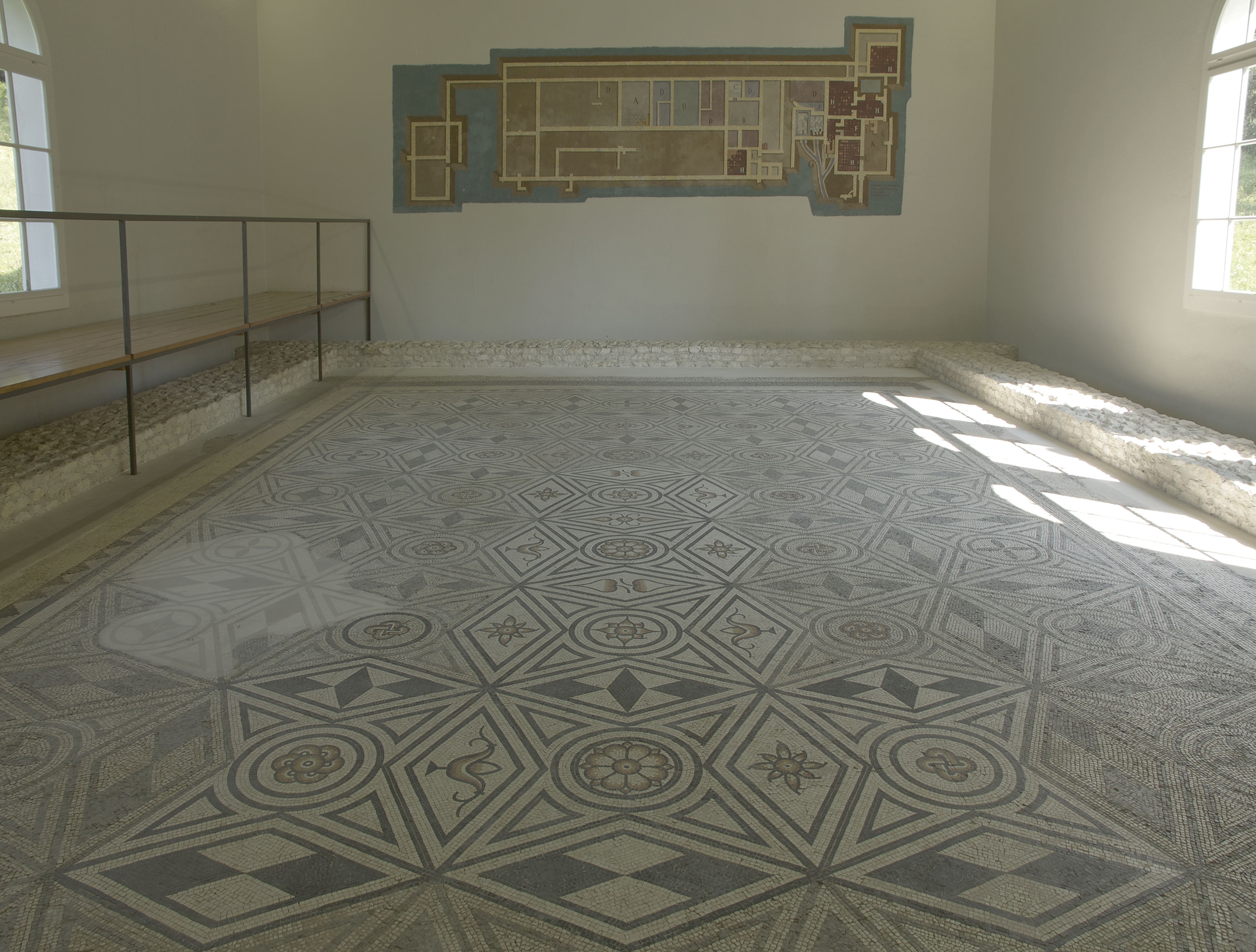 Die Villa rustica in Zofingen. Ein Kulturgut von nationaler Bedeutung, ein sogennantes A-Objekt. Es zeigt den Mosaikboden und Innenraum des nördlichen Schutzbaus. Das Bild ist ein HDRI aus fünf Einzelbildern.